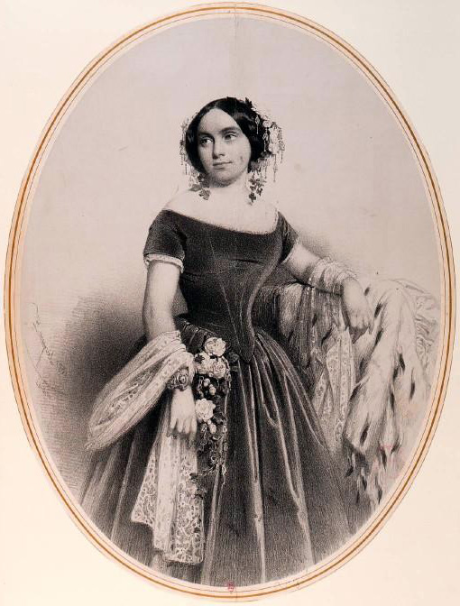 Portrait of Greek opera singer Elena Angri